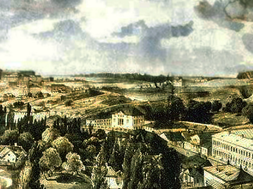 Фрагмент малюнка Грота. Палац Головинського